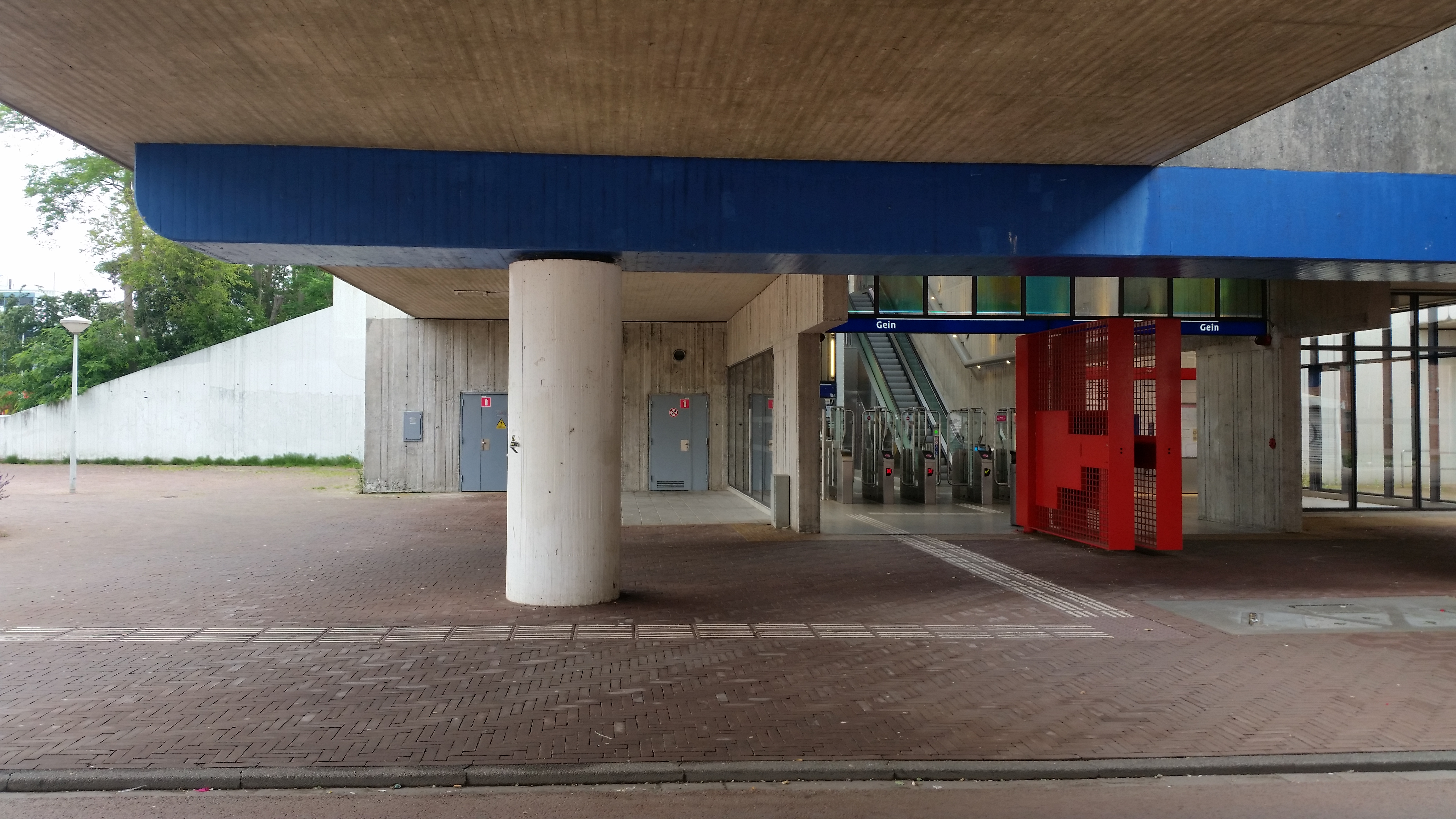 Wisseloordmetrobrug (brug 1726) (juni 2020)